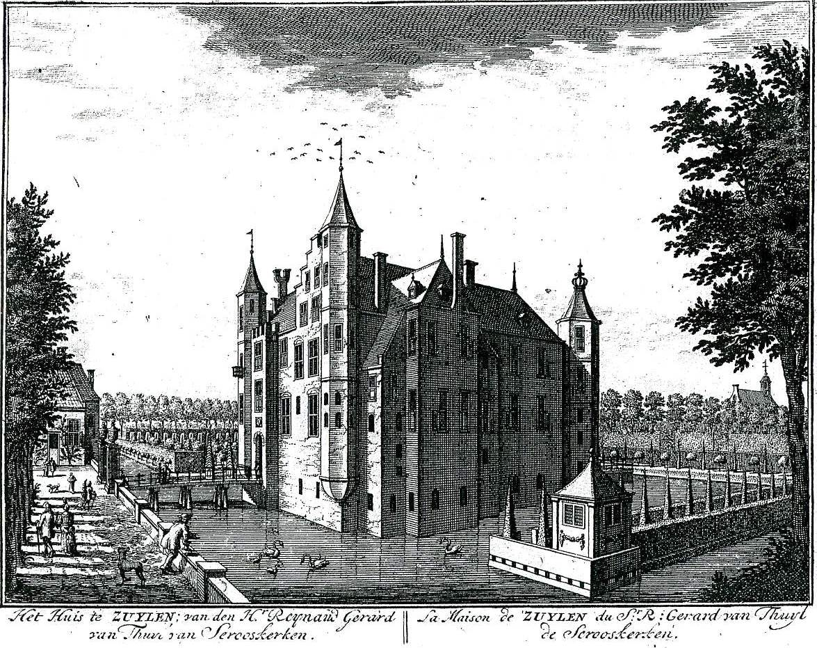 Ets van Slot Zuylen. Afbeelding is gemaakt inde periode dat "Reynaud Gerard Tuyll van Serooskerken" de bewoner was (van ca 1700 tot ca 1751).